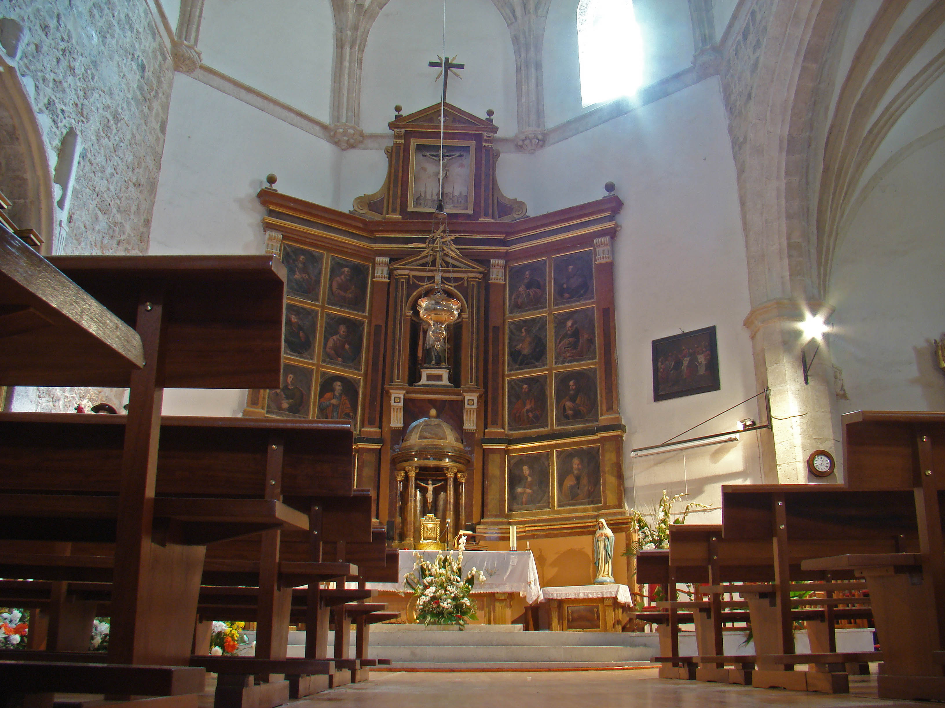 Aldeamayor de San Martín (Valladolid, España). Retablo mayor de la iglesia de San Martín de Tours.